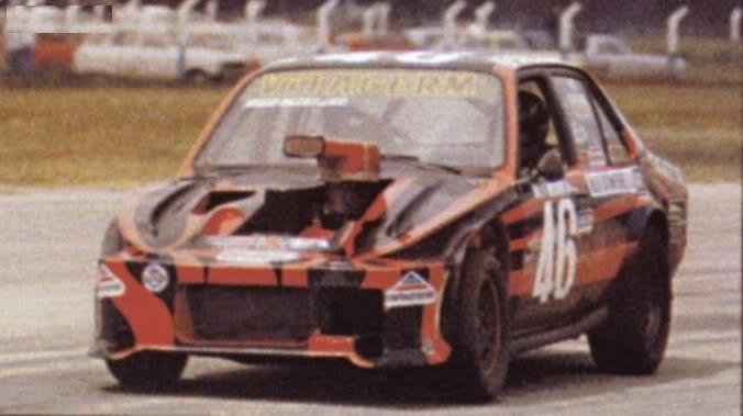 Opel K-180 de TC 2000, año 1985. Piloto: Rolf Becker. Tomada hace 26 años.